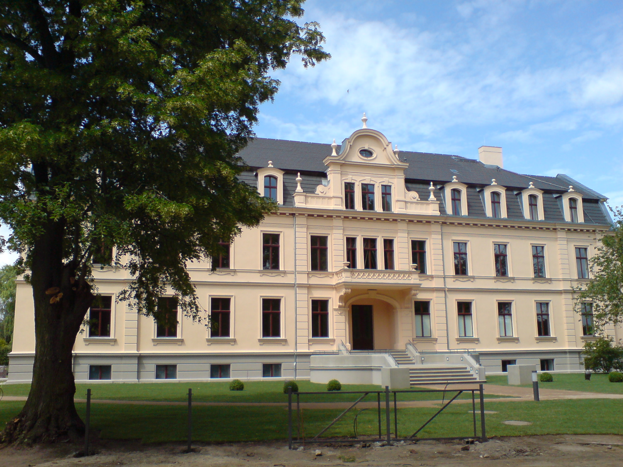 Schloss Ribbeck im Havelland